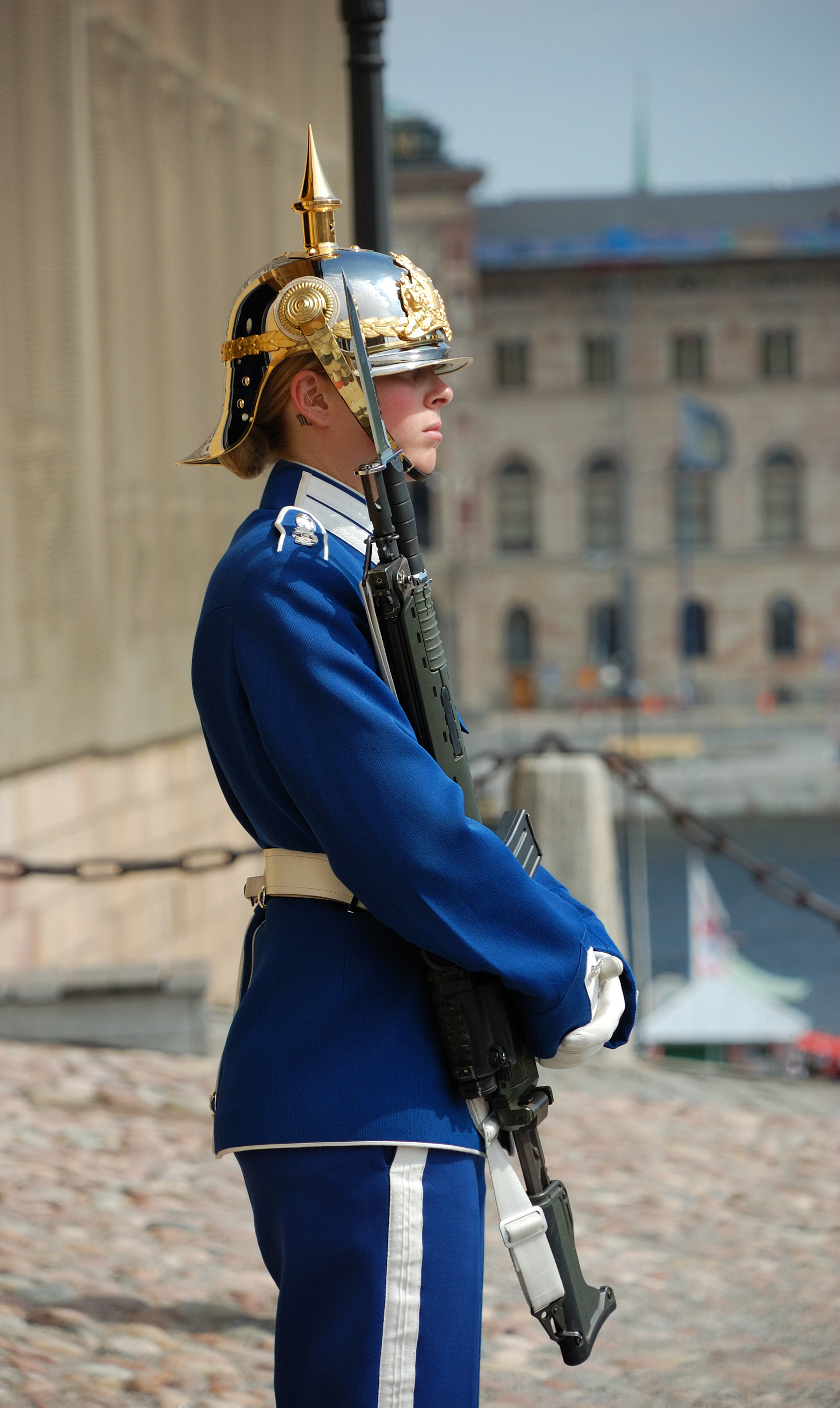 Female Royal Guard